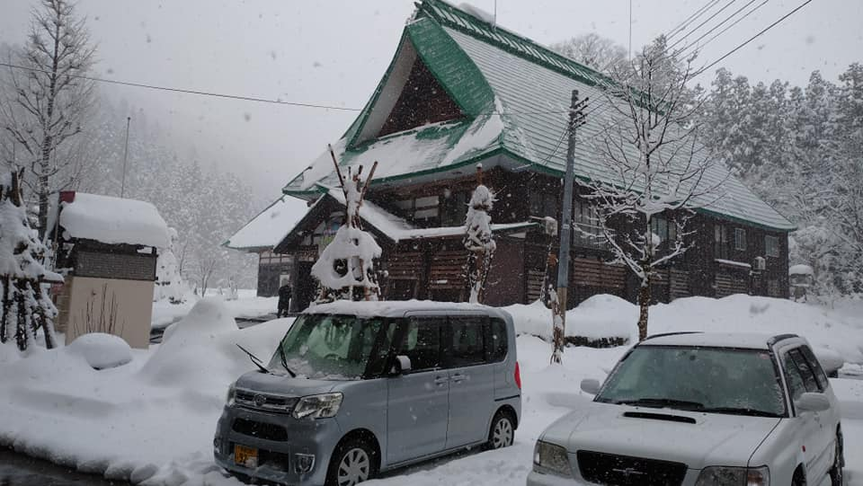 冬の龍源寺 2020-02-08